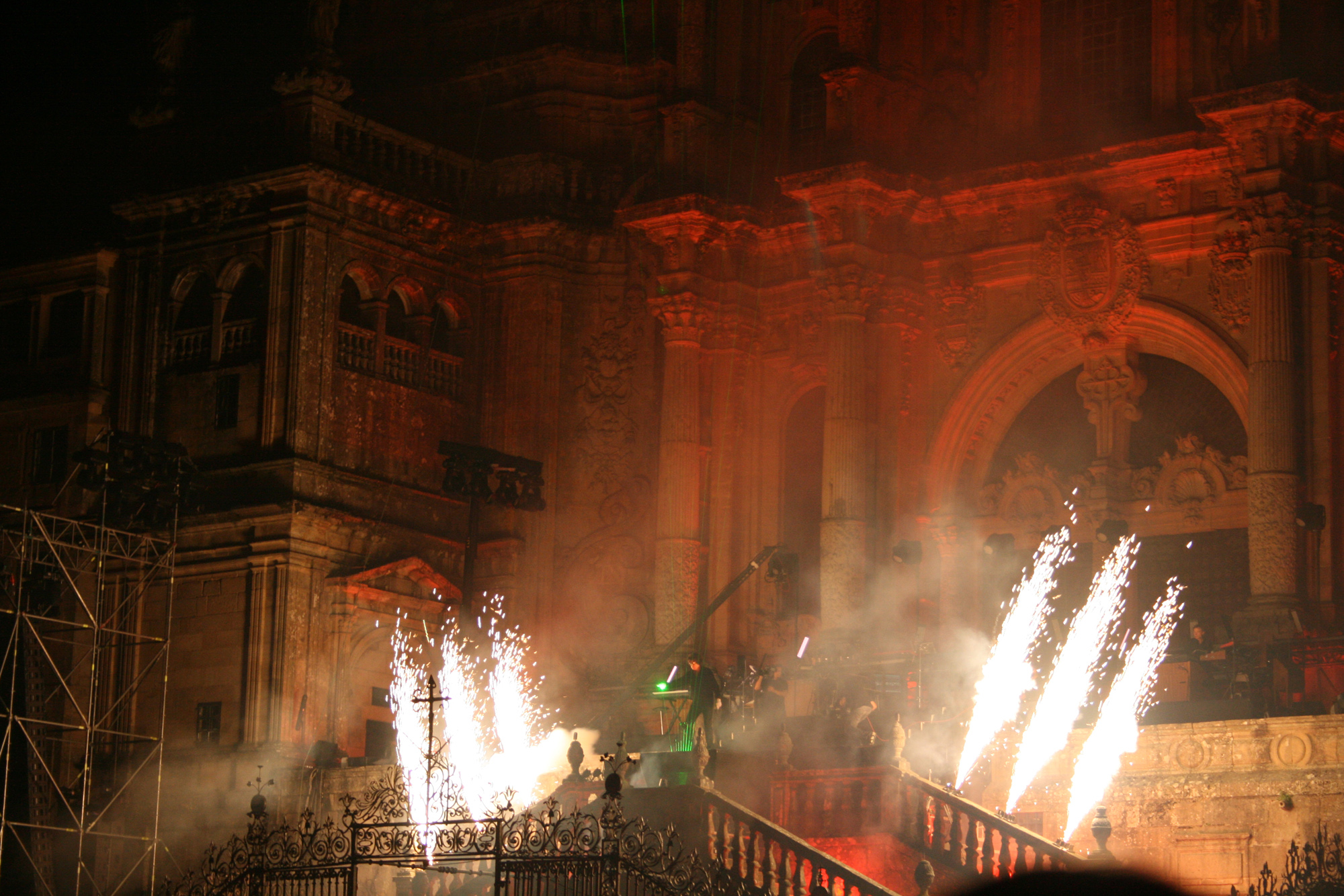 Concierto de Jean Michel Jarre en Santiago de Compostela (Galicia, España) el 31 de julio de 2010. Concert of Jean Michel Jarre Concert of Jean Michel Jarre in Santiago de Compostela (Galicia, Spain) on July 31th of 2010.